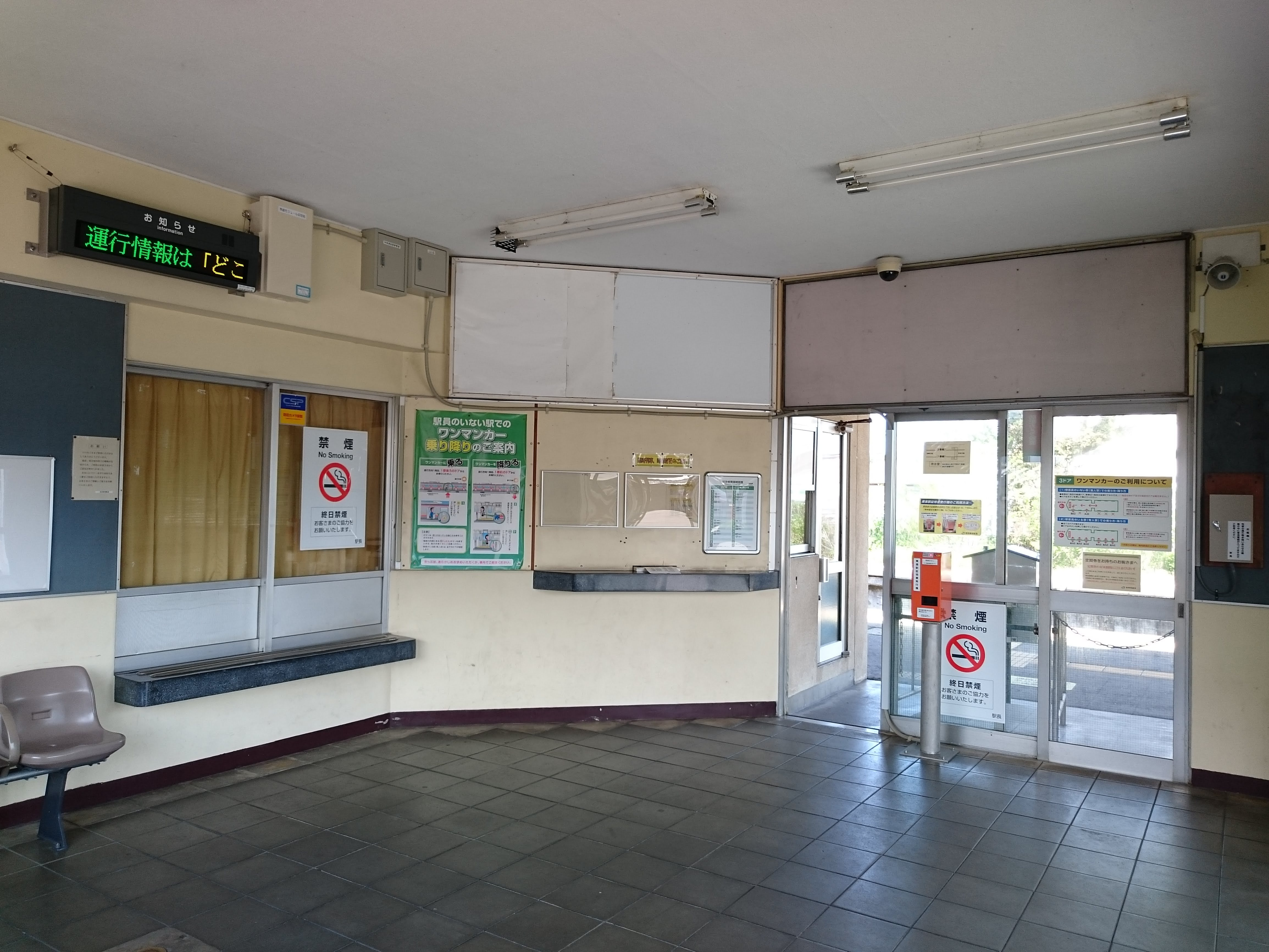 小島谷駅のコンコース（無人化後）